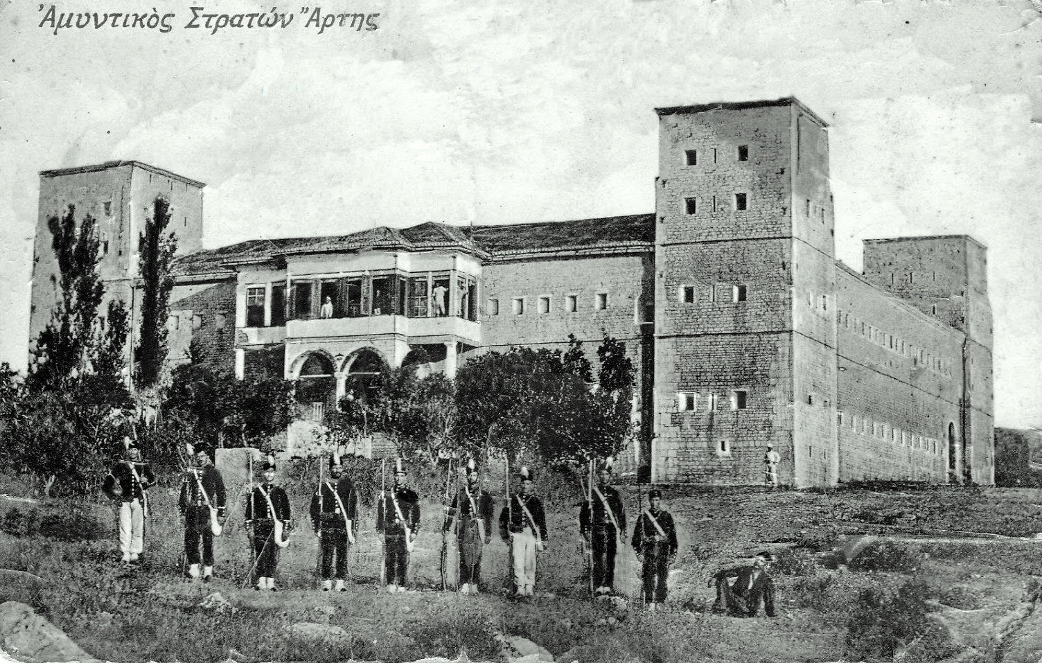 Αμυντικός Στρατώνας Άρτας και Γαριβαλδίνοι, 1897.